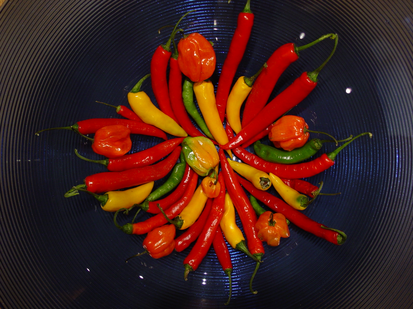 Kleurrijke schaal met allerlei hete pepers.